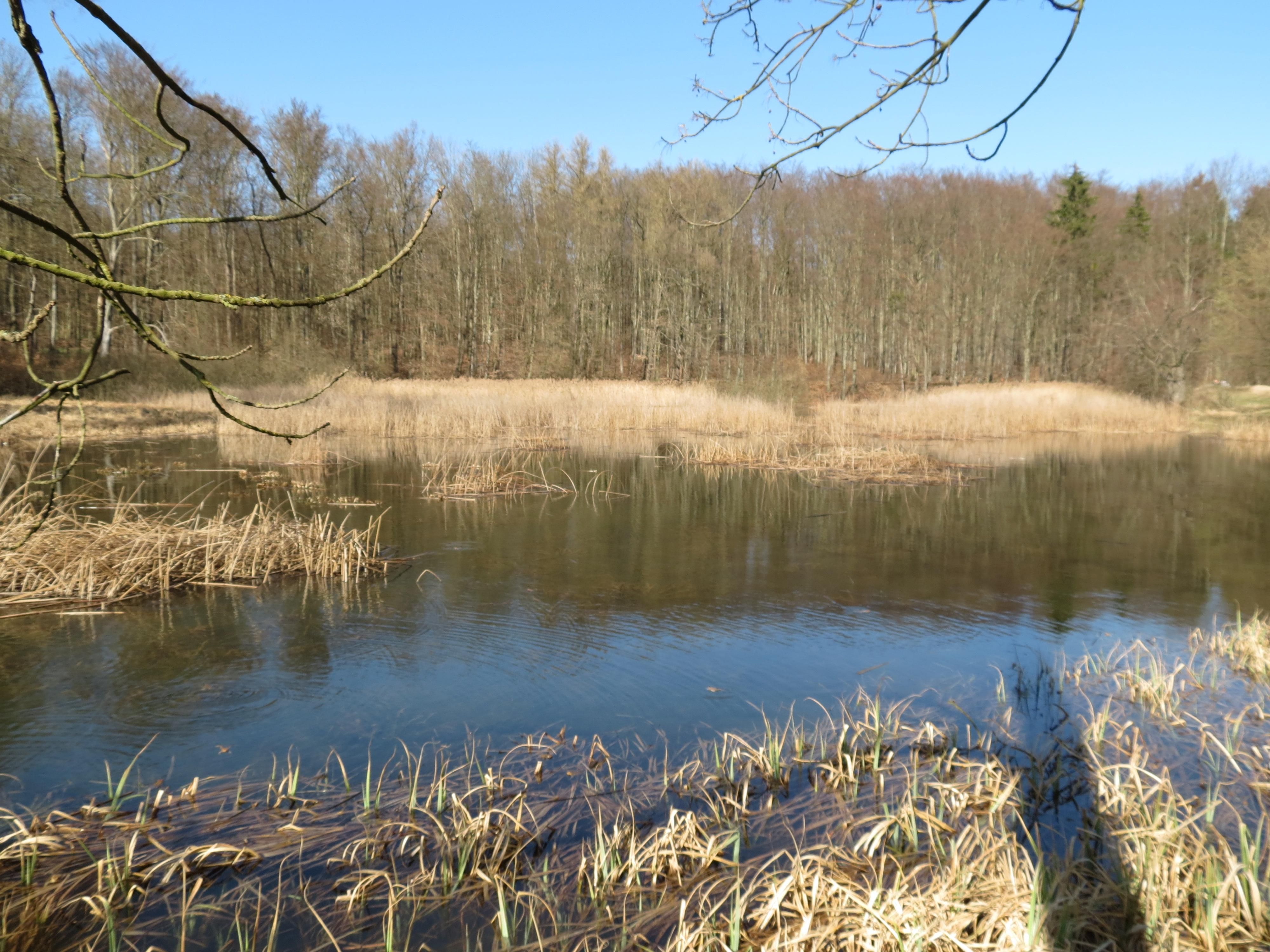 Der Kälberteich am Südwestrand des Volkenrodaer Waldes.